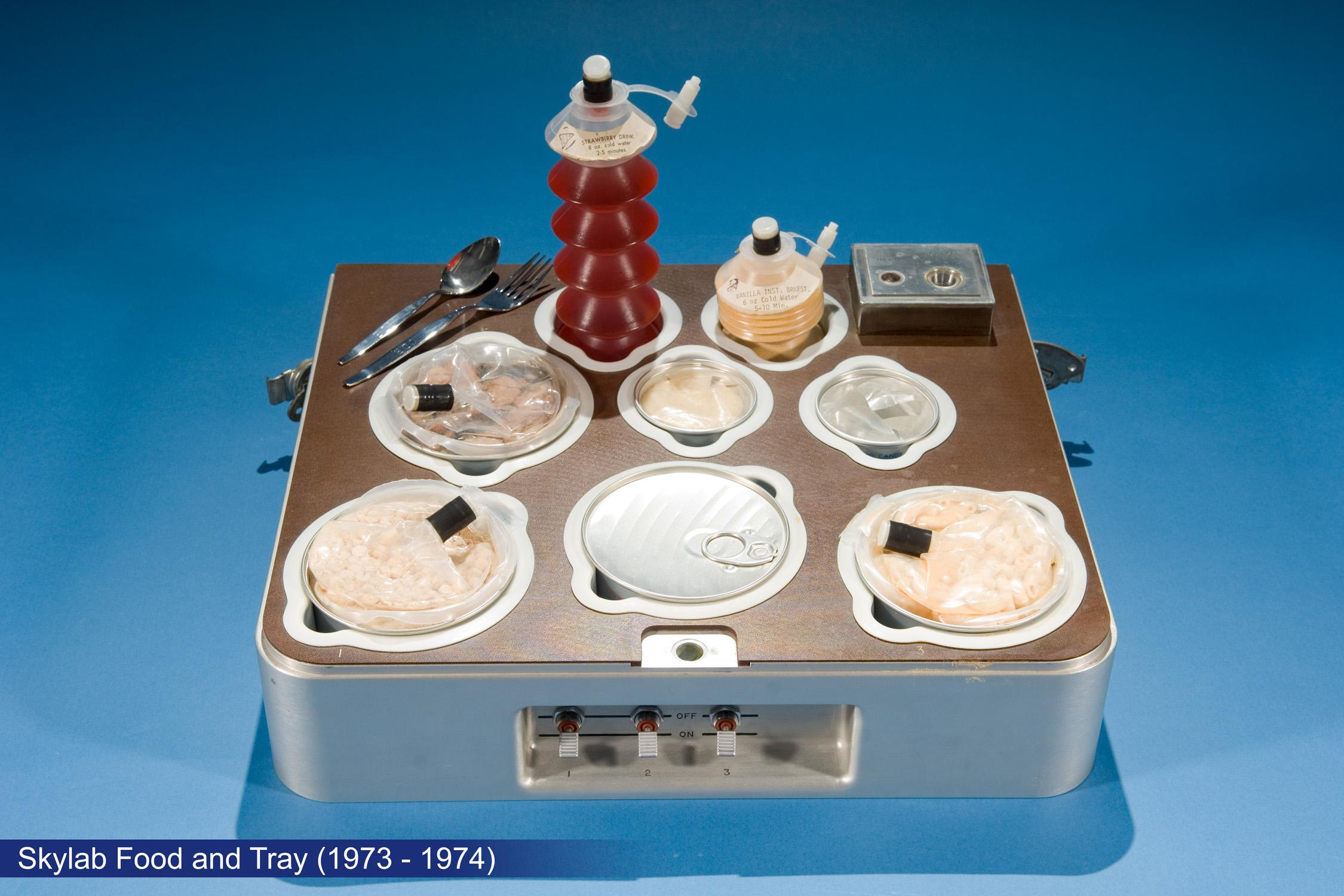 Skylab Food and Tray (1973 - 1974)